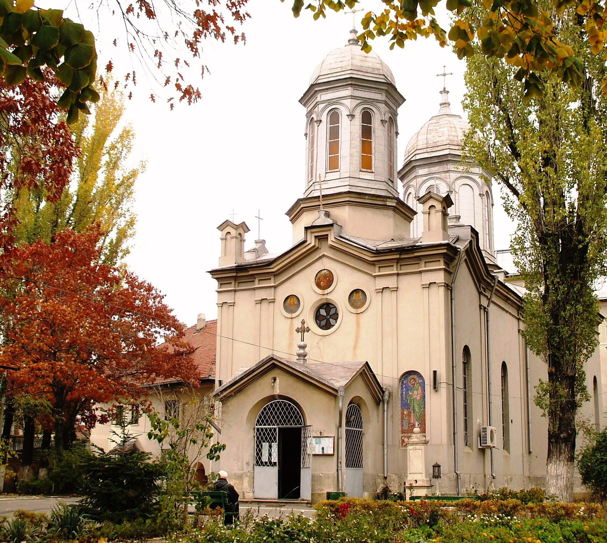 Biserica Hagiu, Bucureşti